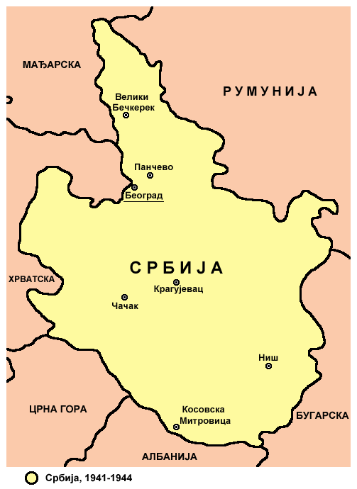 Serbia, 1941-1944, Serbian language version.Srbija, 1941-1944, verzija na srpskom jeziku.